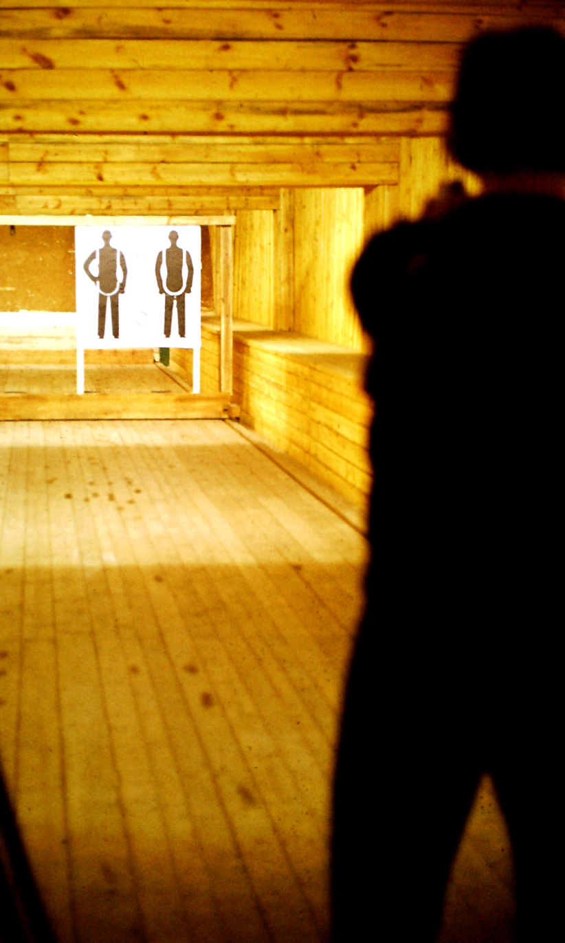 Schießstand mit Personenscheiben